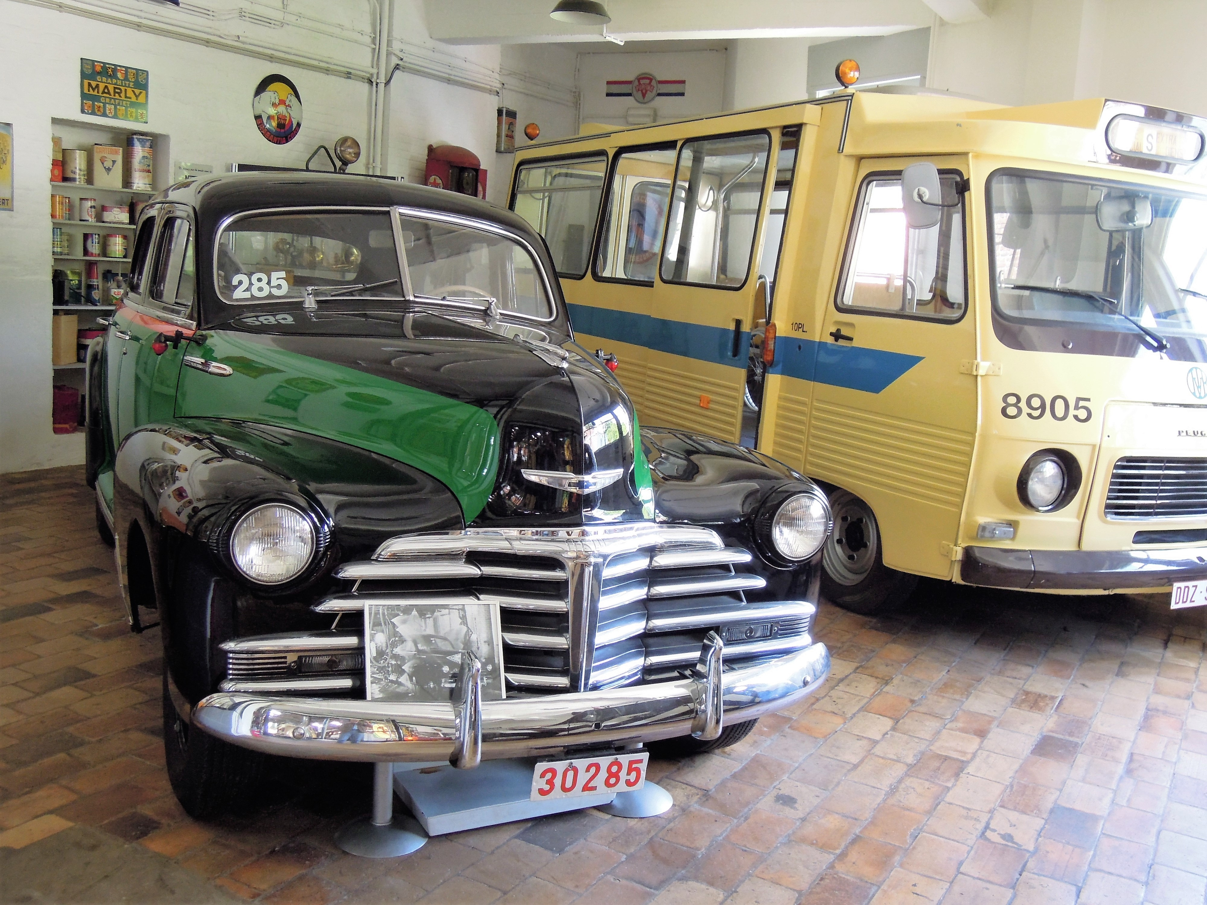 Die folgenden Aufnahmen entstanden im Musée de Tram, dem Straßenbahn-Museum der Brüsseler Verkehrsbetriebe STIP. Die liebevoll restaurierten alten Fahrzeuge sind allesamt fahrbereit.